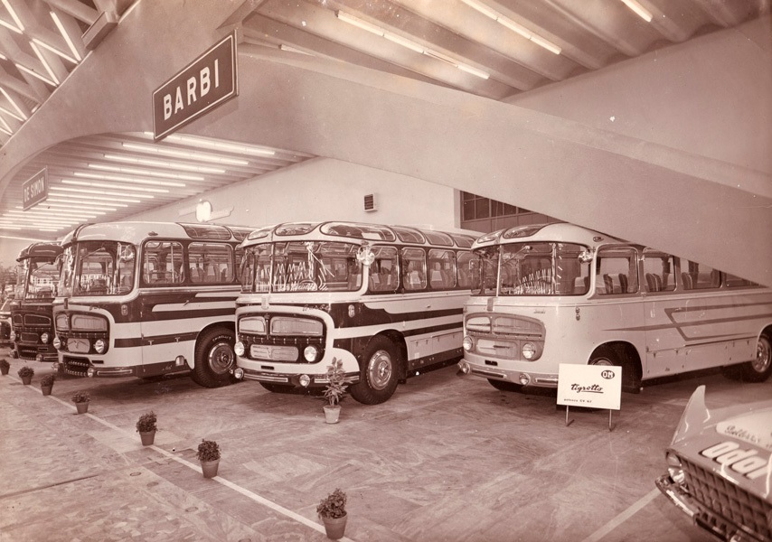 Autobus della Carrozzeria Barbi esposti al Salone dell'Automobile di Torino nel 1950